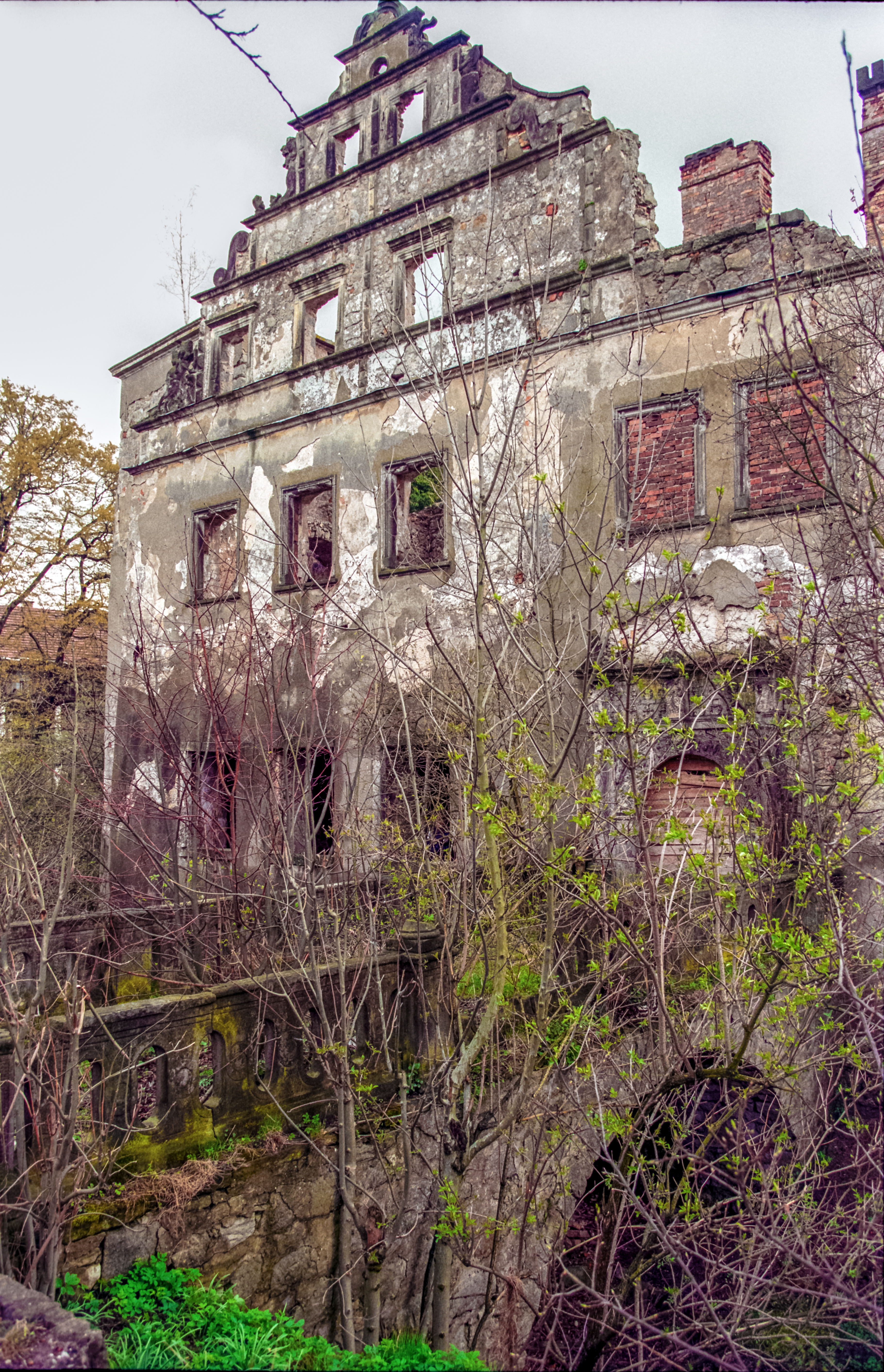 Gościszów - ruina zamku, XVII, XIX